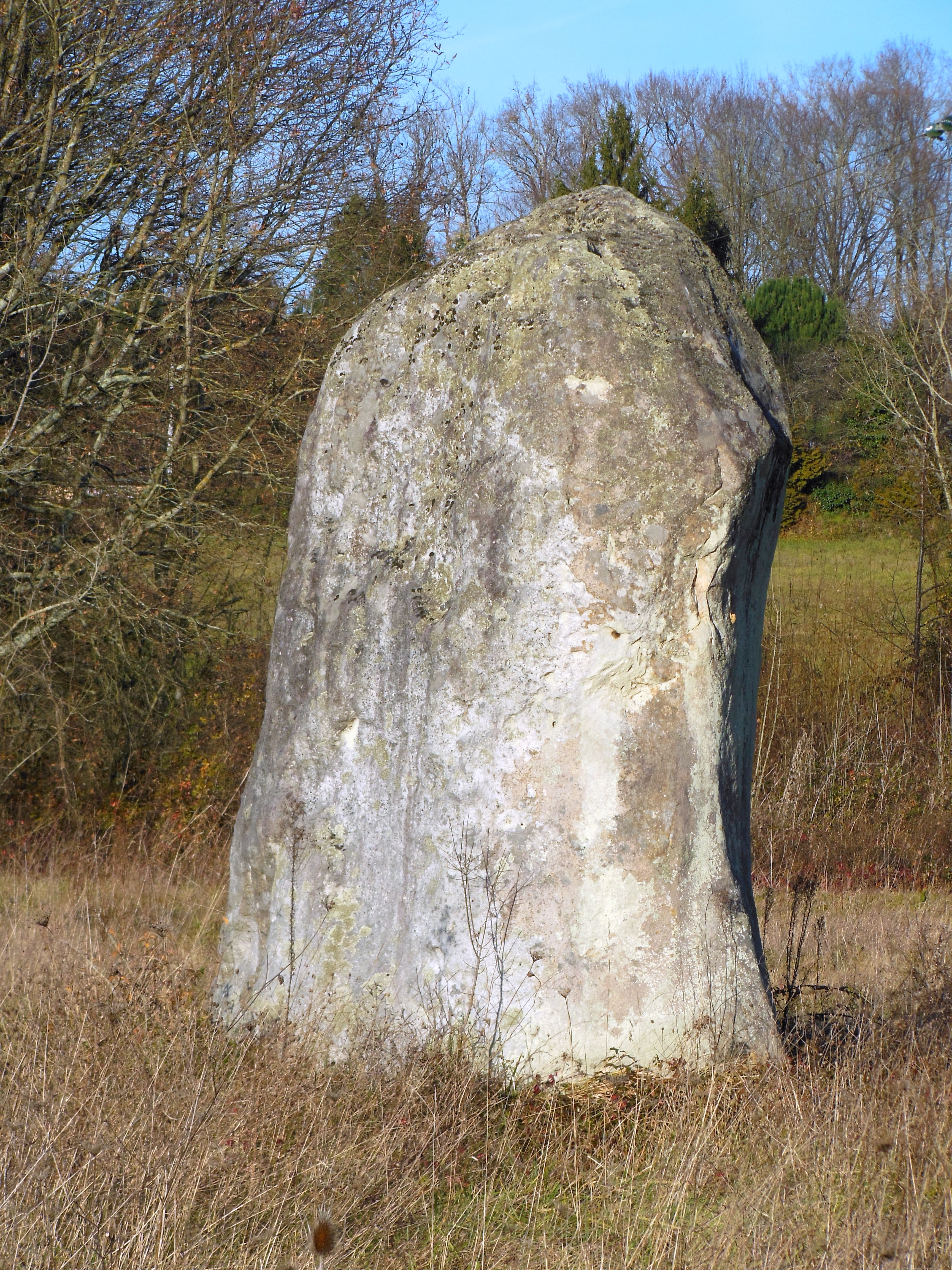 Menhir Peyrelounque sur la commune de sainte-Colombe (Landes, france)